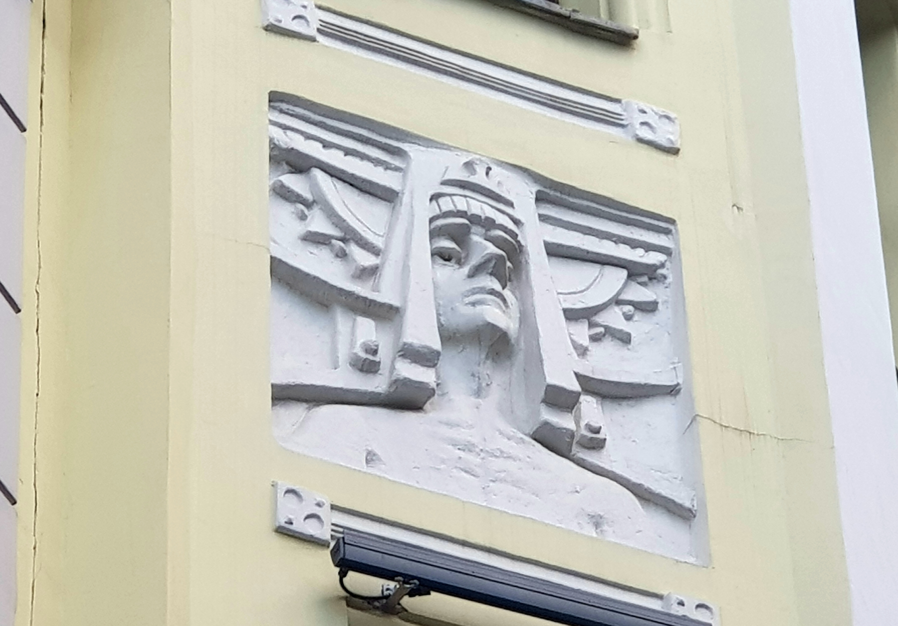 Маскарон на фасаде доходного дома Бочаровых, 1902-1903 гг, арх-ры Л. Н. Кекушев, К. Ф. Буров. Москва, Гоголевский бульвар, д. 21, стр. 1